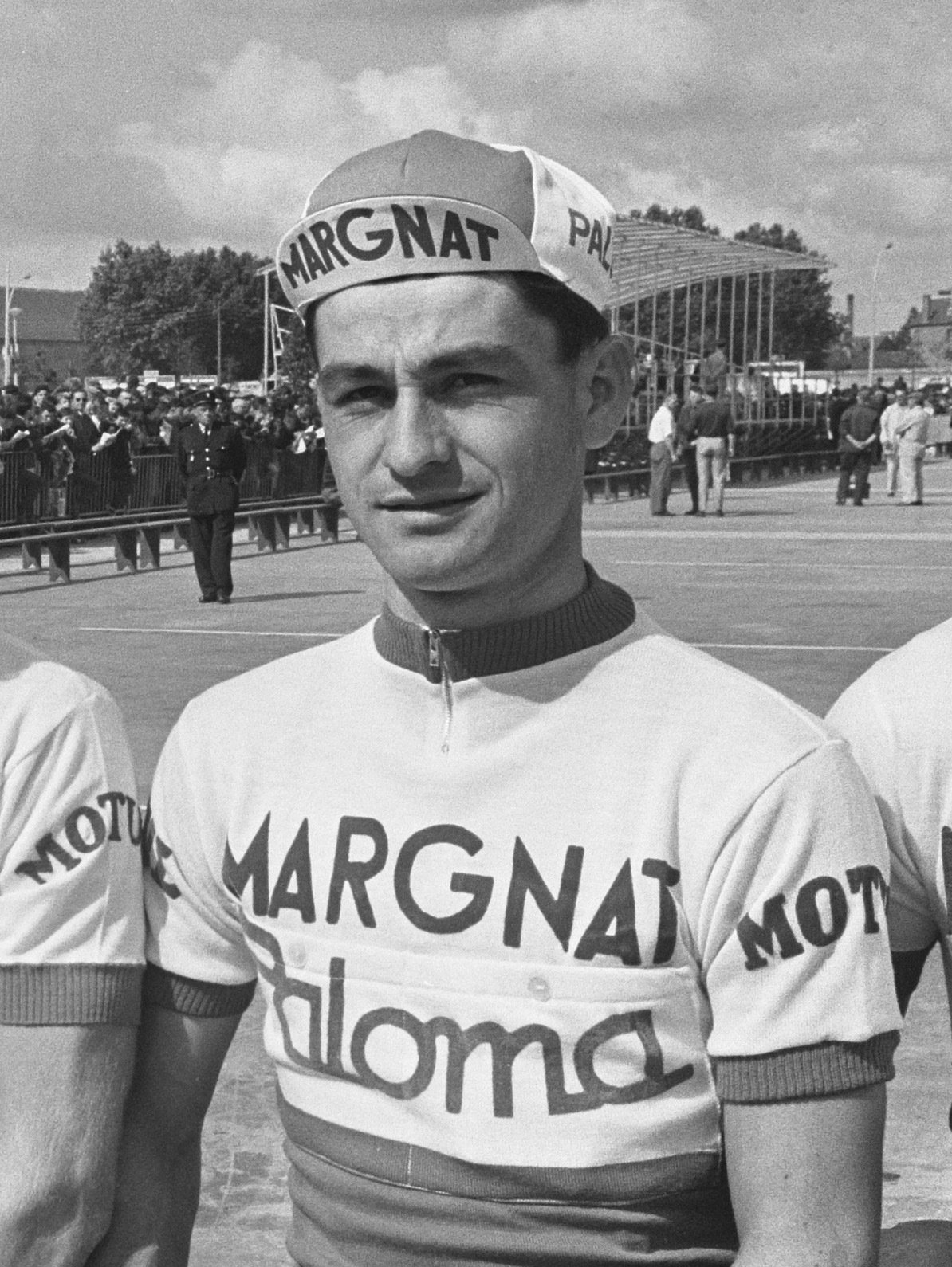 51ste Tour de France 1964, de ploeg van Margnat met in midden Andre Darrigade.